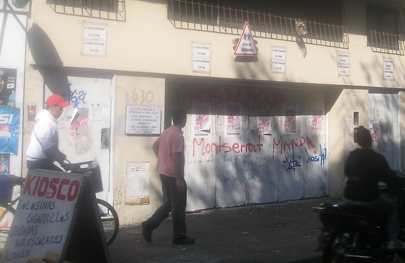 Centro Clandestino de Detención en Virrey Cevallos 630, Ciudad de Buenos Aires. Fecha: 11 de abril de 2006. Autor: Pepe Robles. La subre el autor.